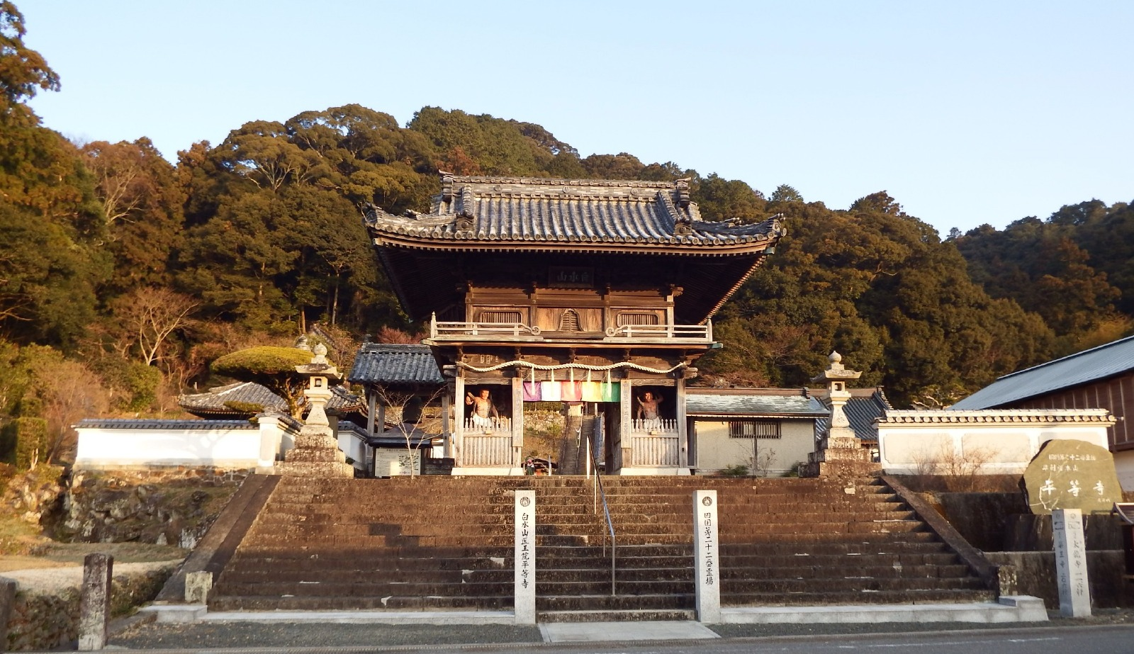 平等寺の仁王門